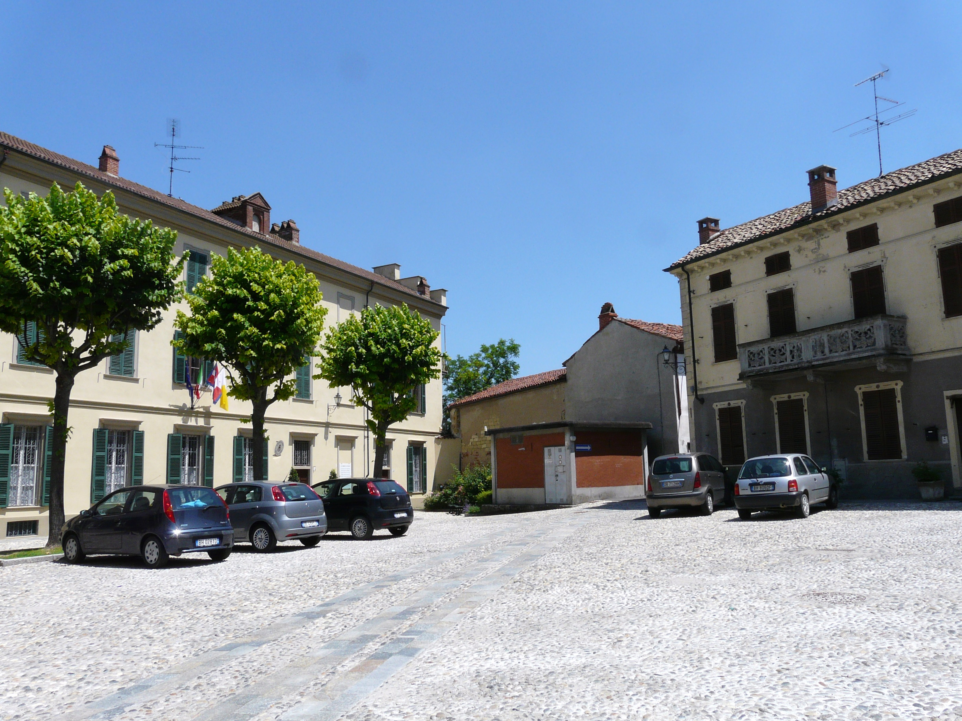 Piazza Australia, Conzano, Piemonte, Italia